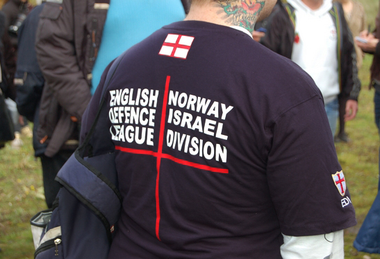 Demonstrant van de 'English Defence League' (EDL).